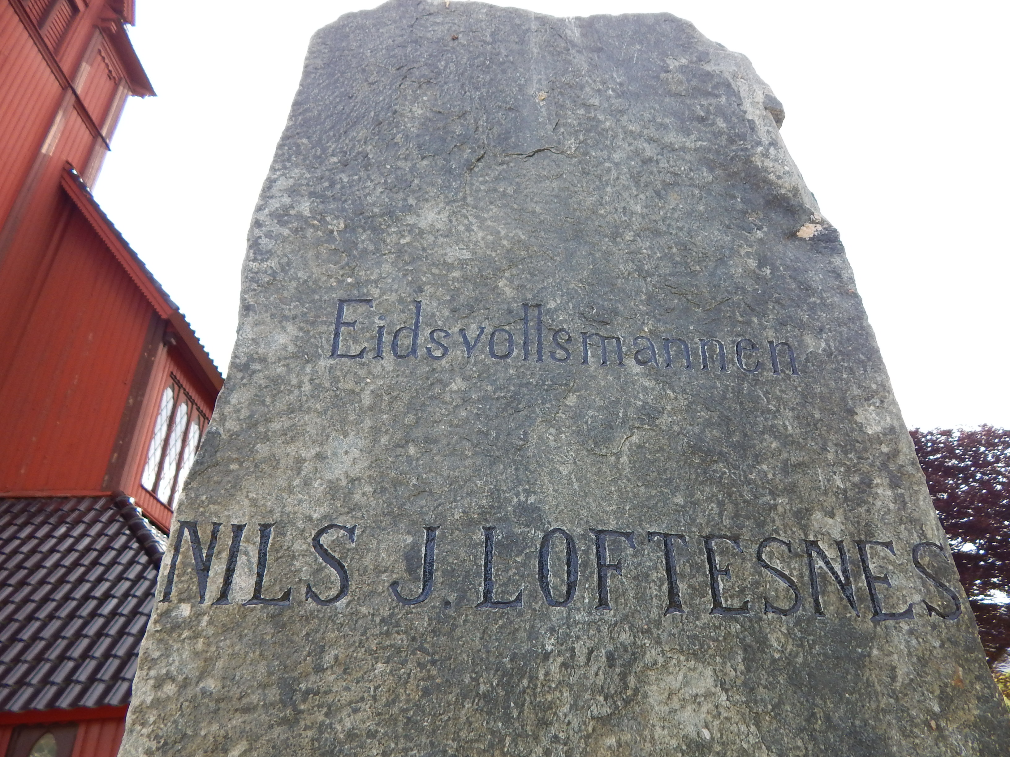 Minnesmerke over Nils Johannesen Loftesnes utenfor Stedje kirke i Sogndal